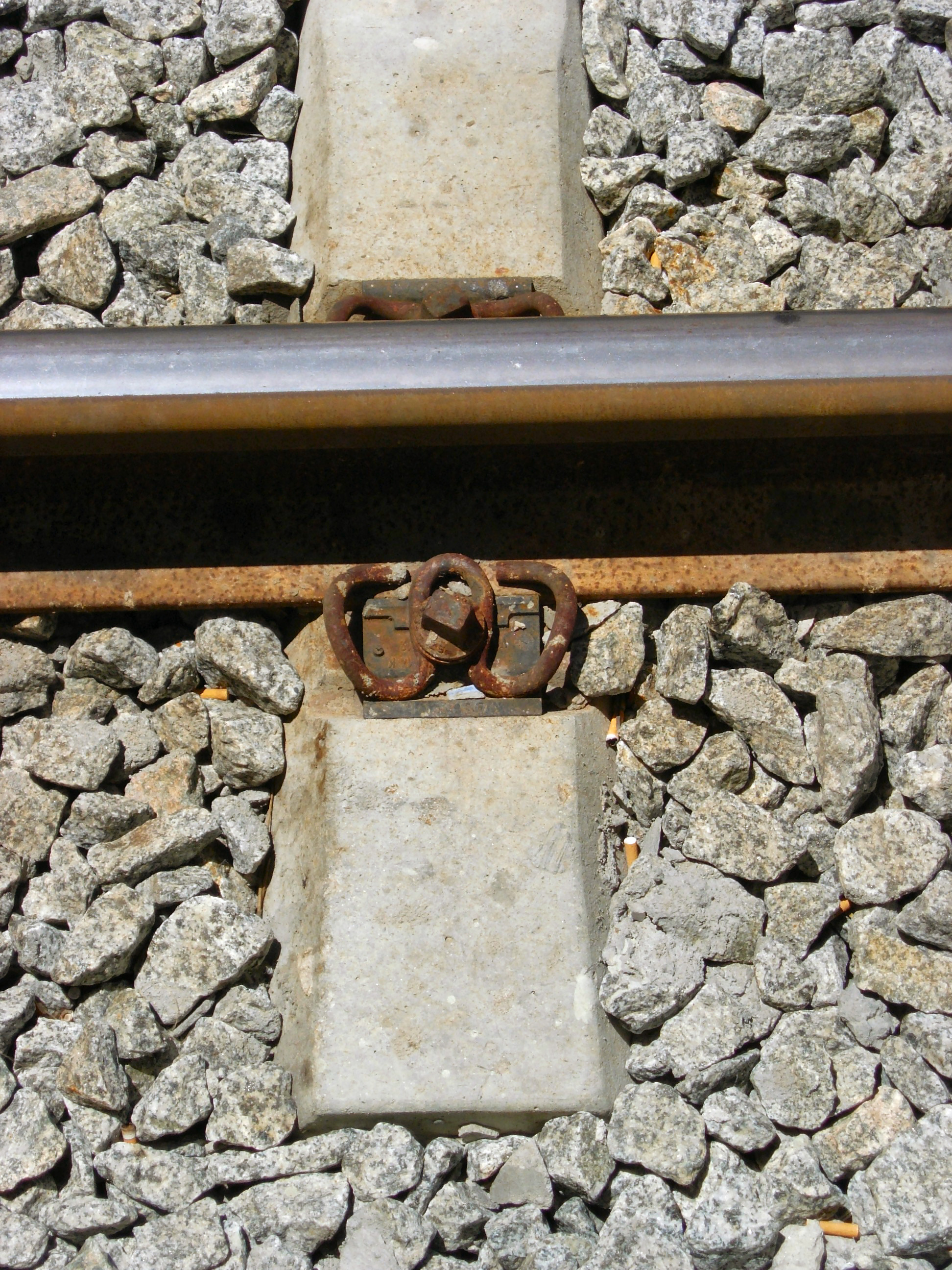 coina, portugal